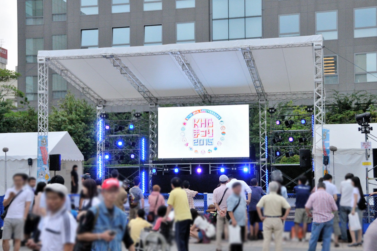 KHBまつり2015 まつりステージ